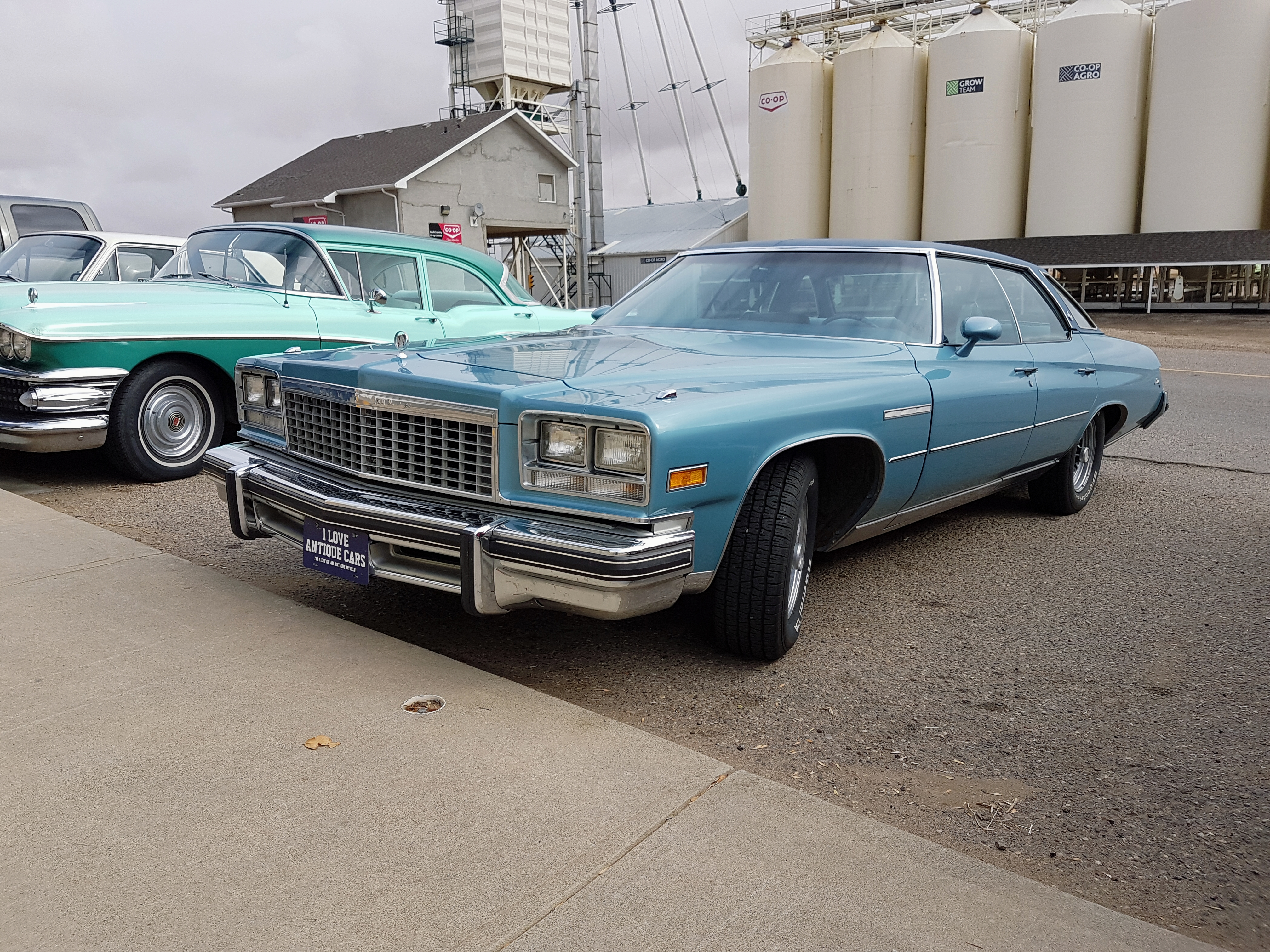 1976 Buick LeSabre